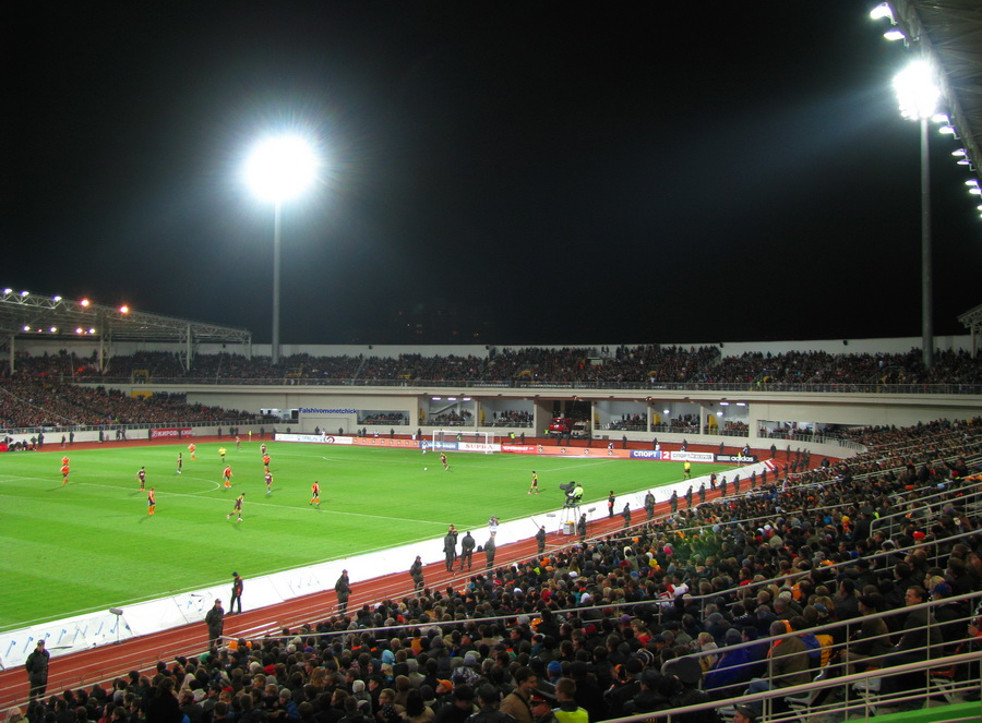 Центральный стадион во время матча Урал - Анжи